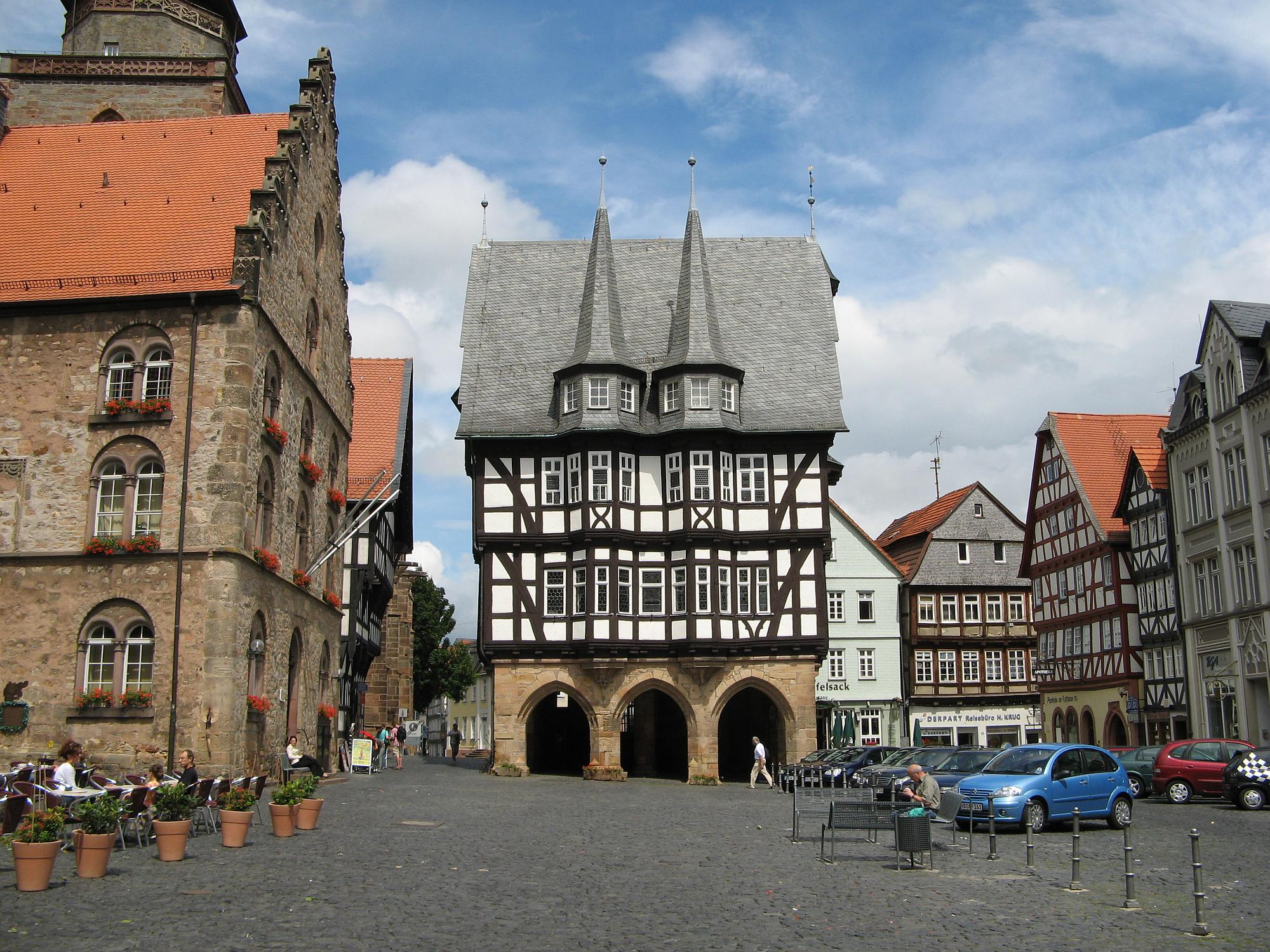 Das Rathaus in Alsfeld, eines der bekanntesten deutschen Fachwerkhäuser